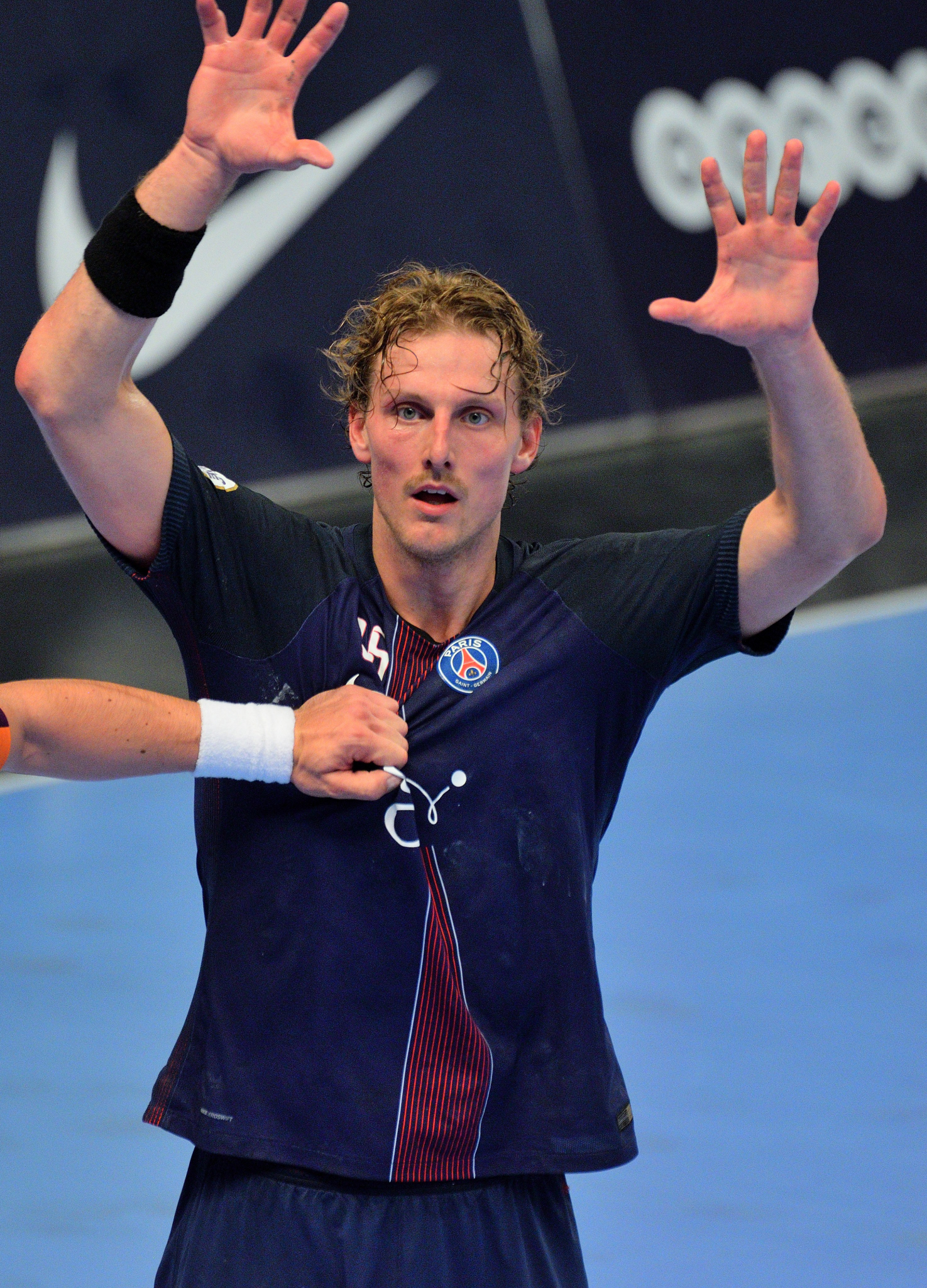 Match entre le PSG Handball et Nantes. A Coubertin, le 08 juin 2017.